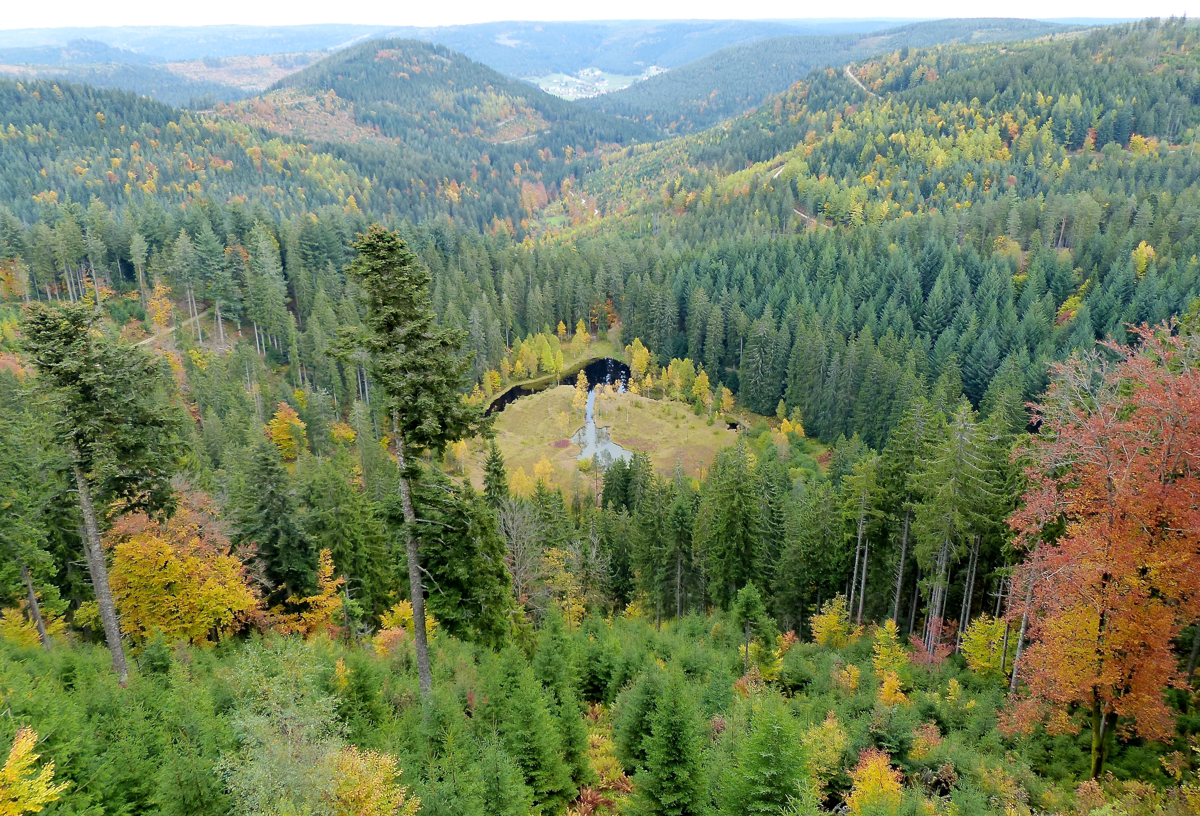 Black Forest: Ellbachsee